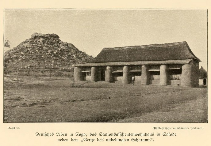 “Wohnhaus des deutschen Stationsassistenten in Sokode” - from Expeditionsbericht der Zweiten Deutschen Inner-Afrika-Expedition (1907-09) Auf dem wege nach Atlantis.